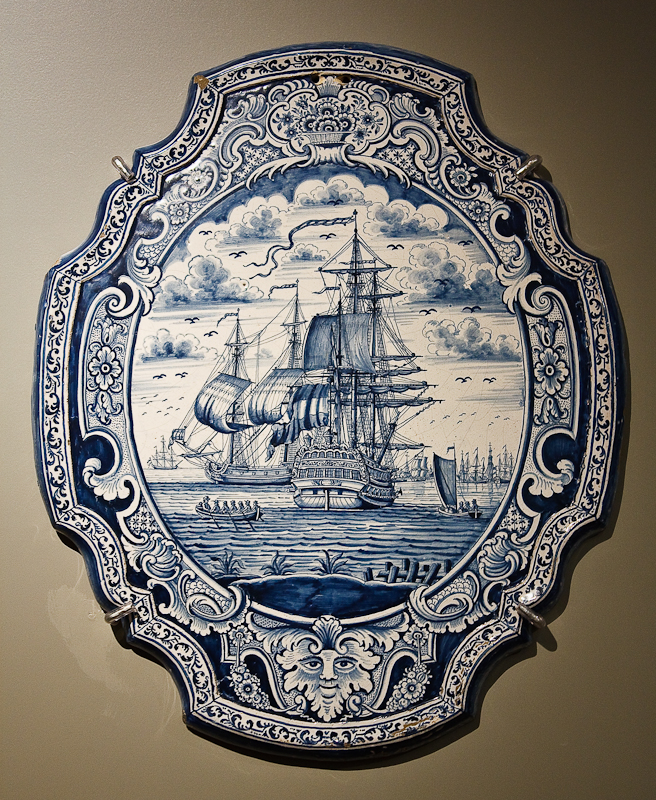 Nederland, Harlingen 1750-1775 gleibakkerij Buiten de Kerkpoort schilder Pals Karsten aardewerk met tinglazuur OKS- 2005-42